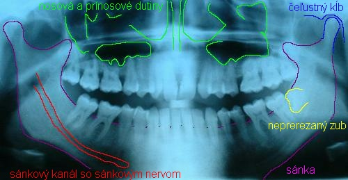 Ortopantomogram človeka s popisom. Zdroj: sk::Obrázok:Ortopantomogram.jpg Autor: Metju Talk on 20th Dec 2004 with FujiFilm 2600Zoom.